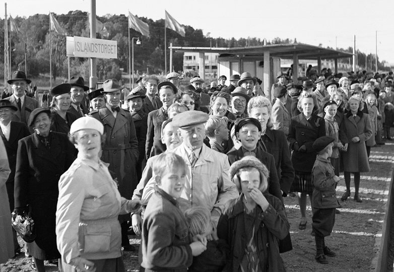 Islandstorget. Människor på perrongen när nya spårvagnslinjen till Ängby invigs 1 oktober 1944